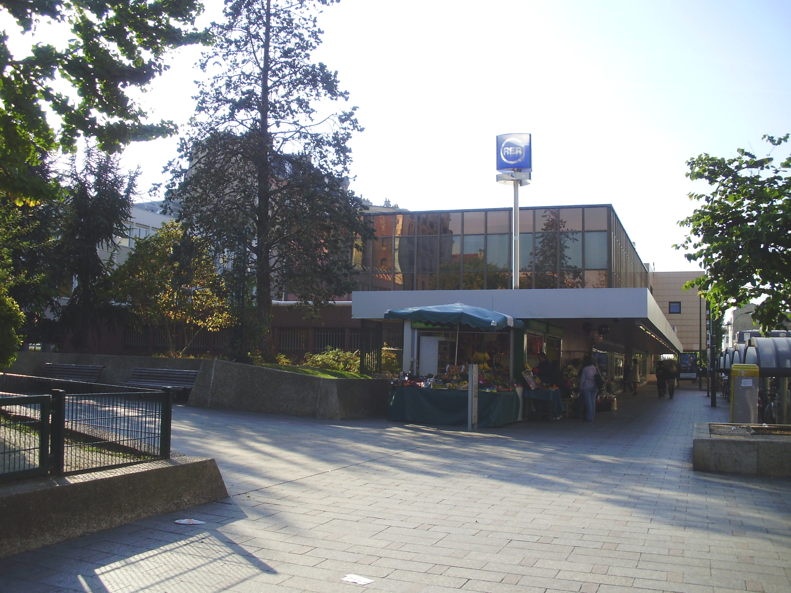 Gare de Vincennes, Val-de-Marne, France : mail au nord des voies le long de l'avenue Aubert devant l'entrée de la gare